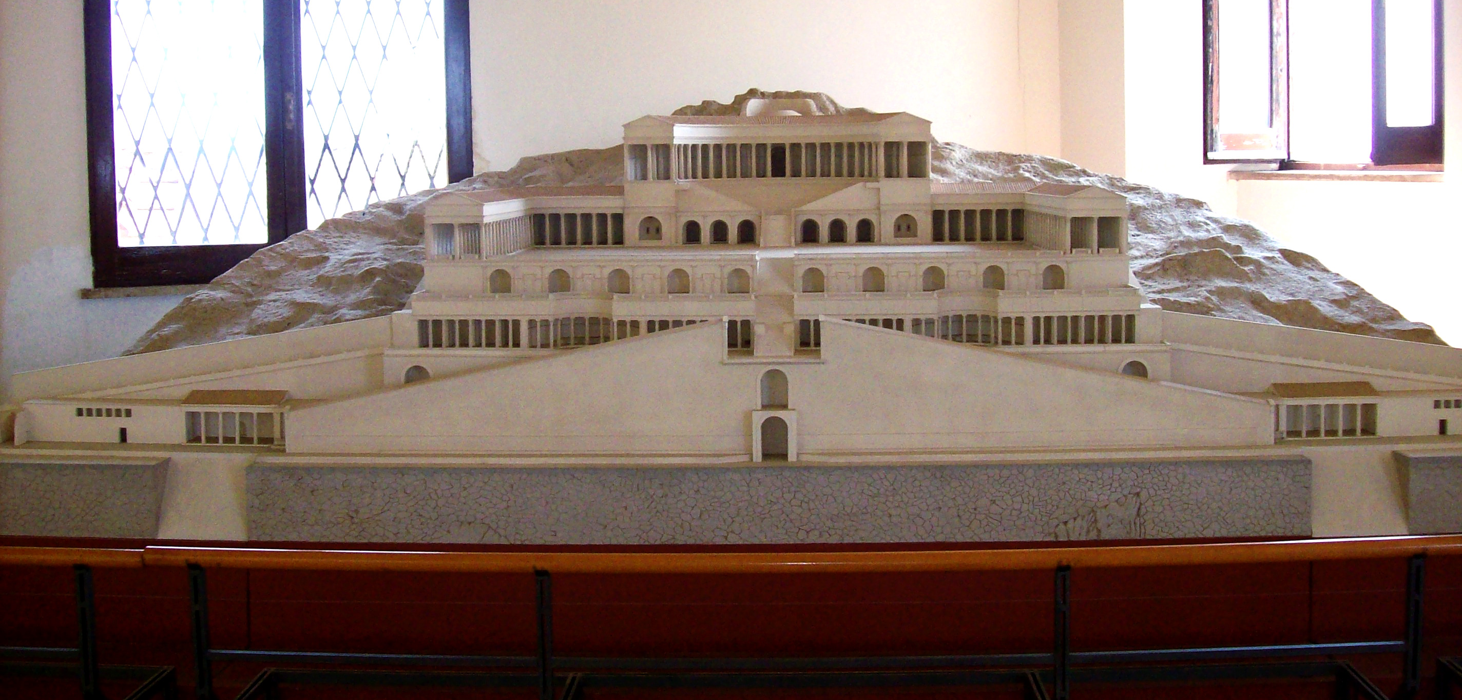 Plastico del tempio della Fortuna Primigenia al museo archeologico prenestino, Palestrina